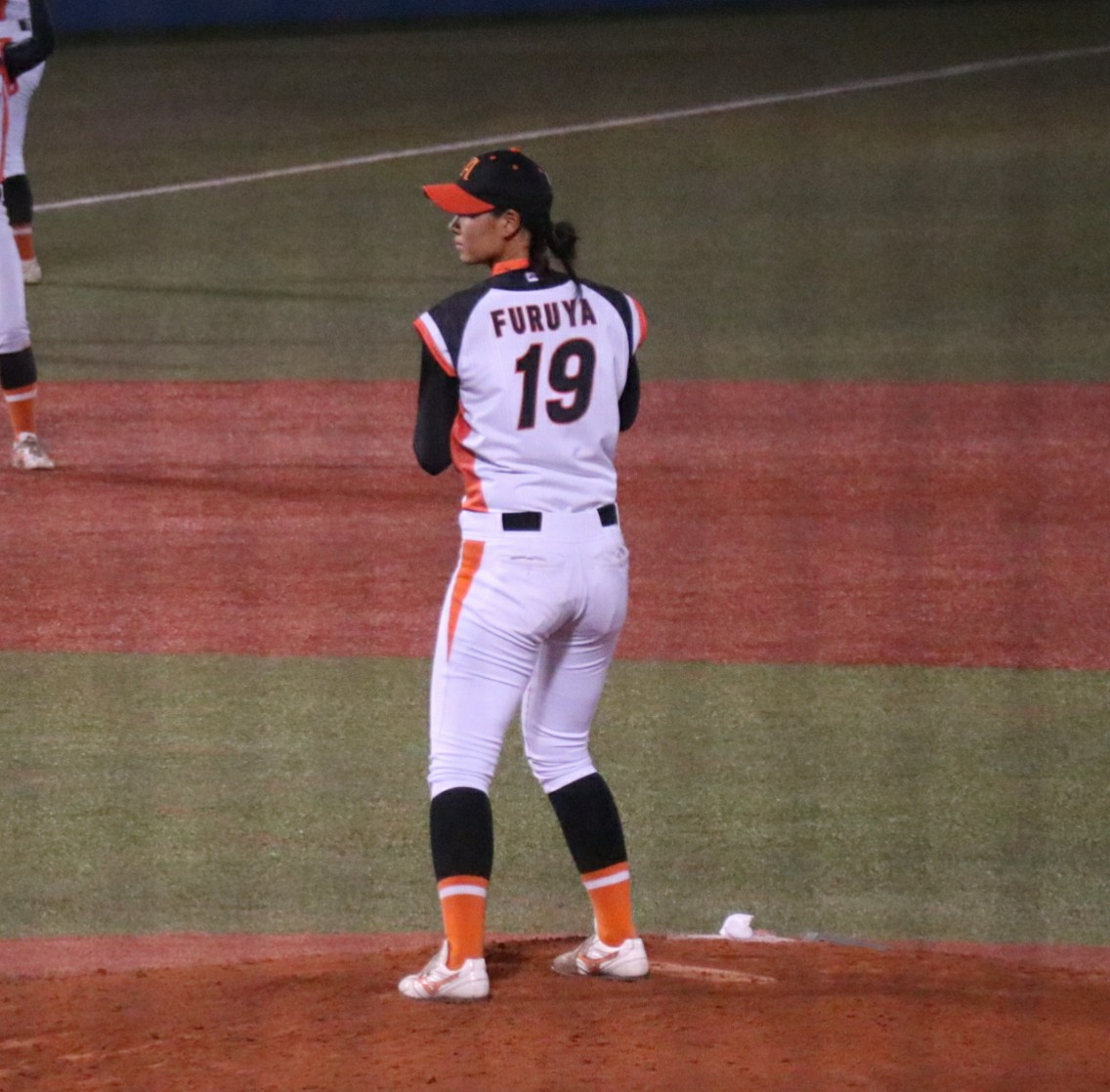 古谷恵菜女子プロ野球投手